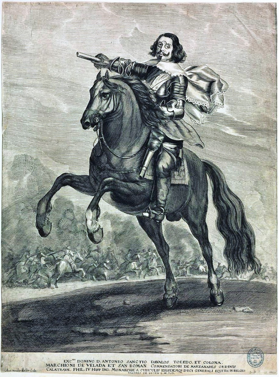 Grabado calcográfico. 40,5 X 30 cm. Biblioteca Nacional de España. Madrid. IH/2480 G Inscripción: EXCmo Domino D. Antonio Sanctio Davalos Toledo et Colona, Marchioni de Velada et San Roman